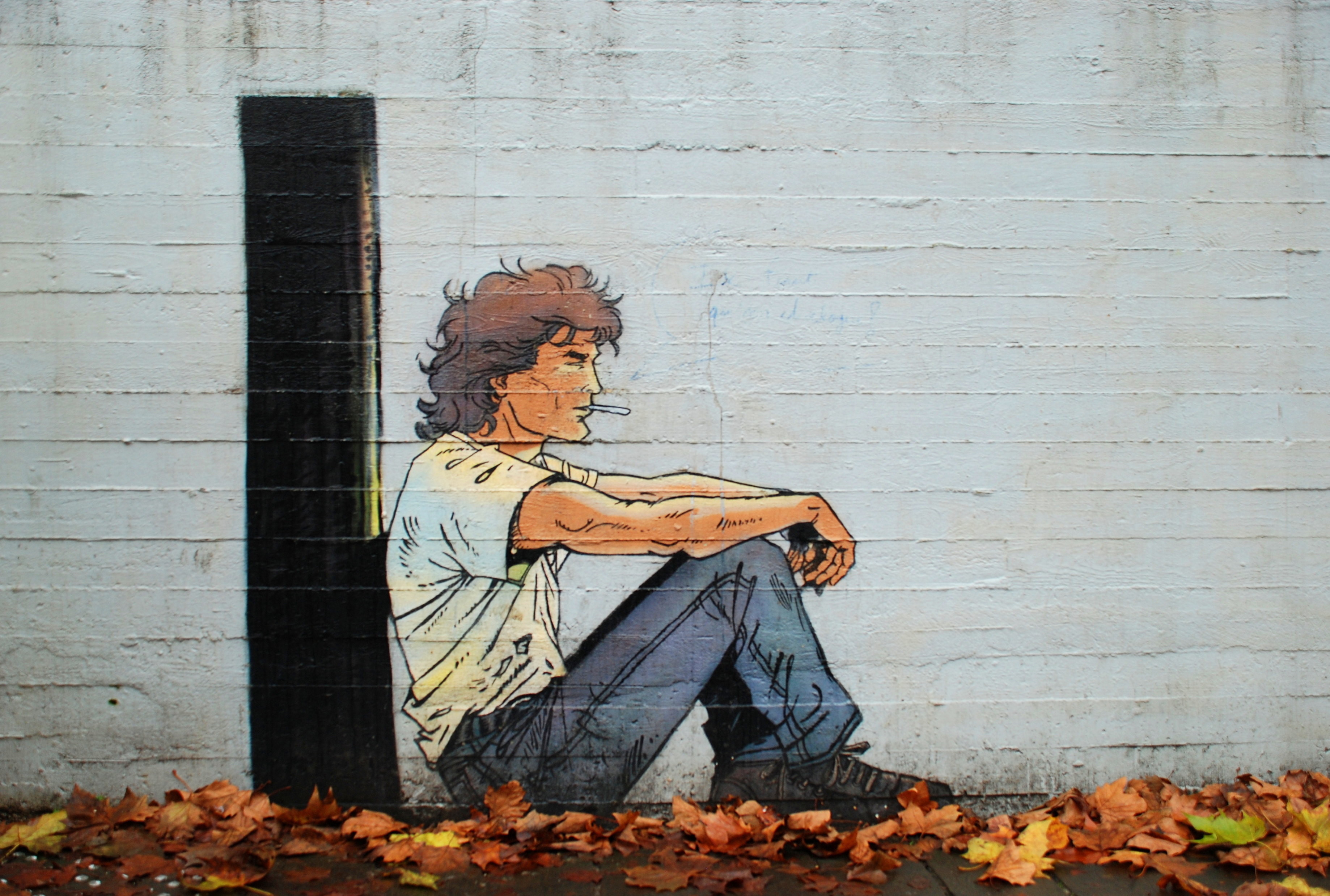 Belgique - Louvain-la-Neuve - Place des Sciences - fresque Largo Winch (FOP in Belgium since 2016)